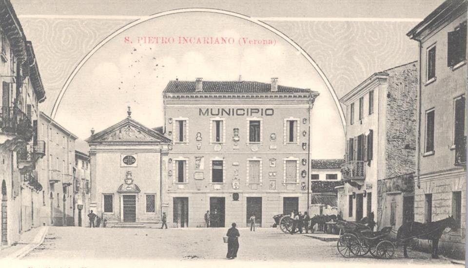 Piazza Ara della Valle a San Pietro in Cariano (povincia di Verona) in una foto d'epoca